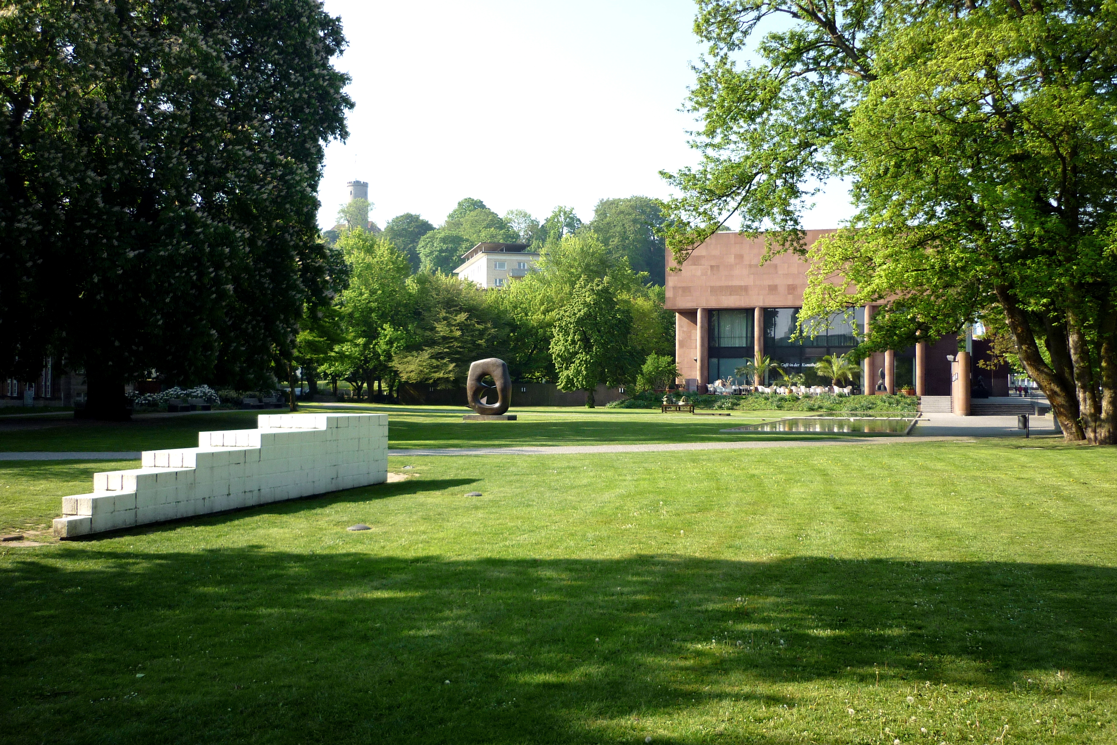 Skulpturengarten der Kunsthalle in Bielefeld, Nordrhein-Westfalen, Deutschland. Im Hintergrund eine Skulptur von Henry Moore und der Turm der Sparrenburg.